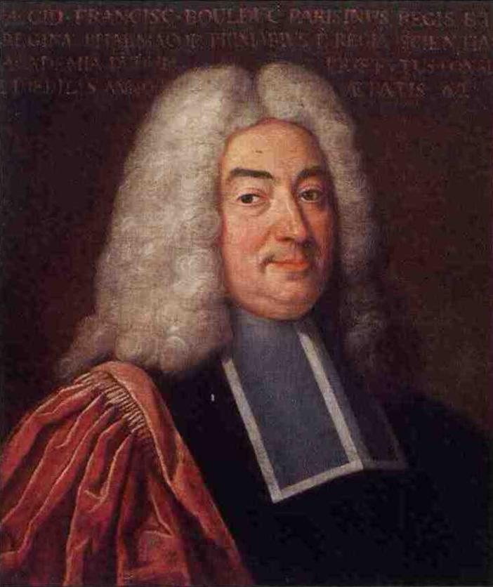 Portrait de Gilles-François Boulduc (1675-1741)